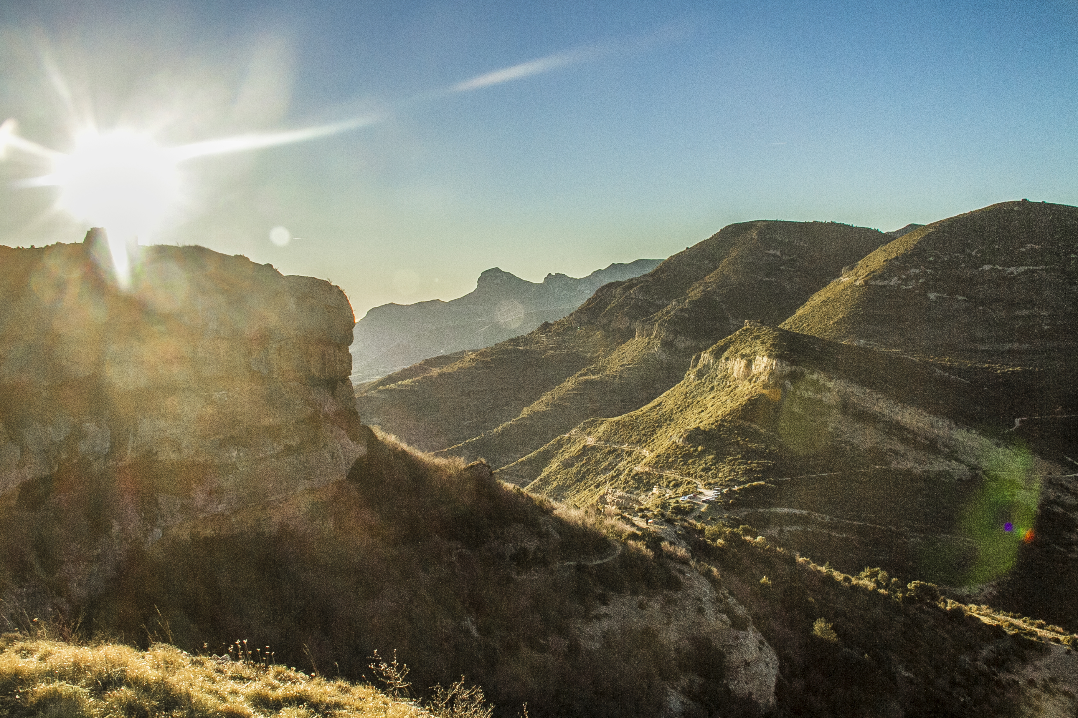 Parque natural de la Sierra y los Cañones de Guara This is a photography of a Special Area of Conservation in Spain with the ID: ES2410005. Natura2000 entry, EEA entry